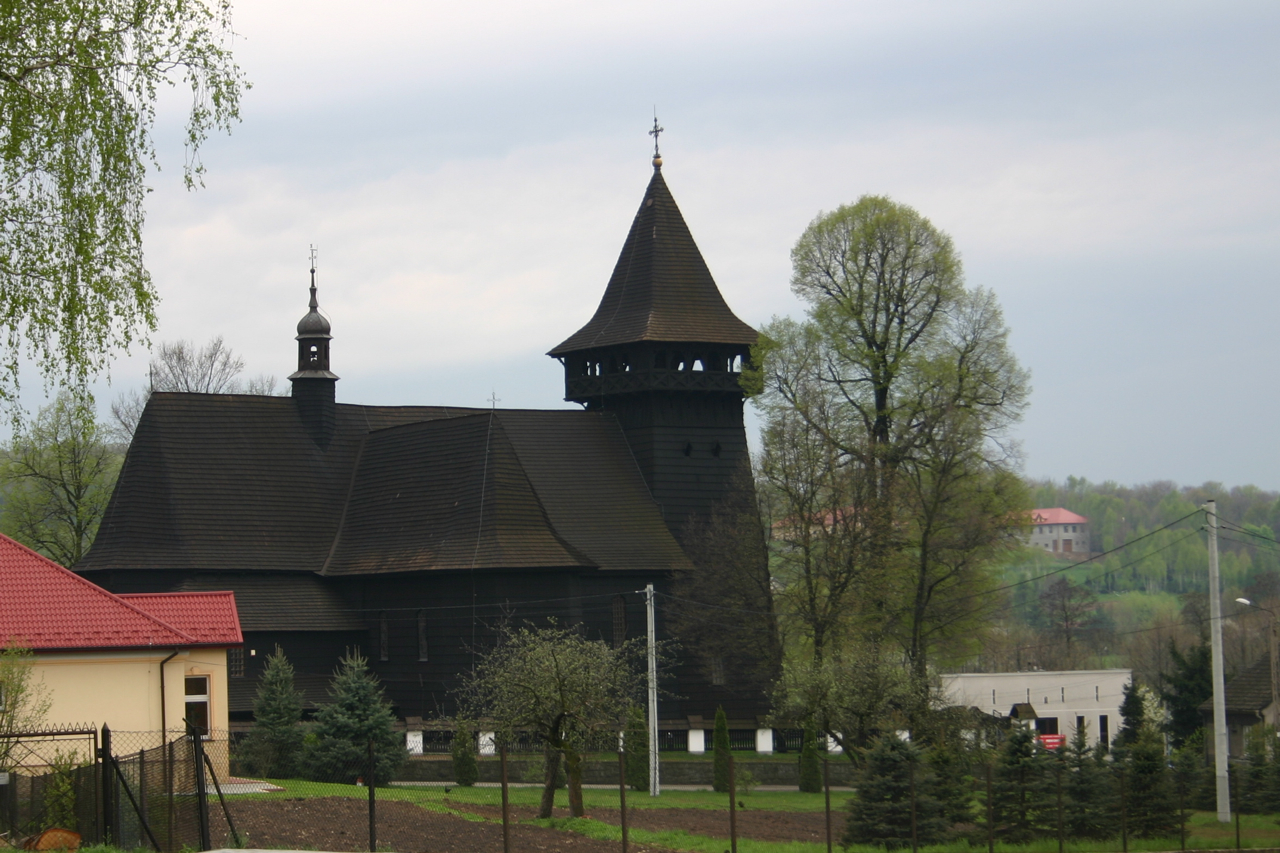 Kościół św. Stanisława w Skrzyszowi w Skrzyszówie, województwo małopolskie. Object location49° 59′ 39″ N, 21° 03′ 31″ E